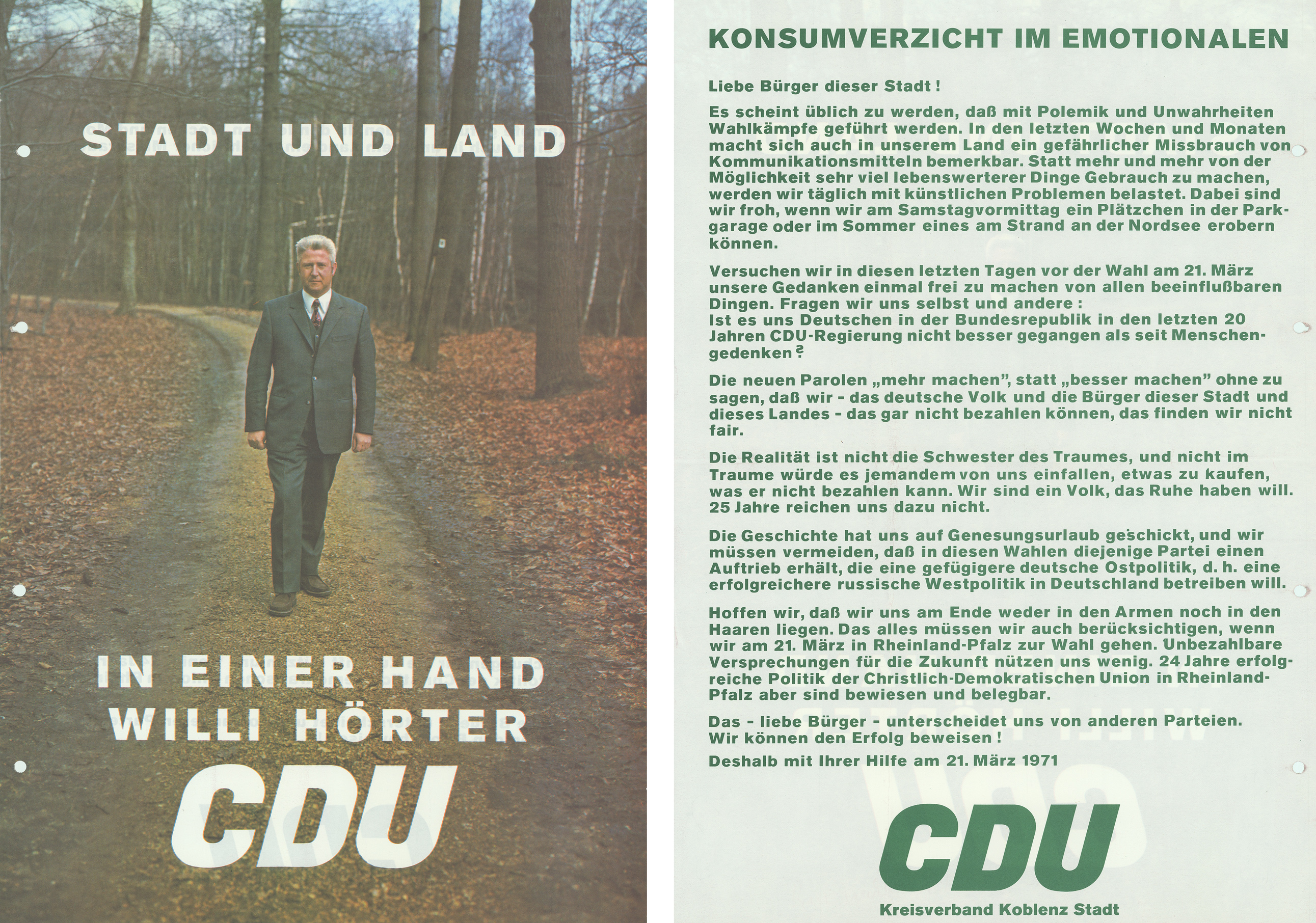 Stadt und Land in einer Hand Willi Hörter CDU Abbildung: Foto beim Waldspaziergang Kommentar: Rückseitig bedruckt mit Ausführungen zum "Konsumverzicht im Emotionalen" ... Plakatart: Kandidaten-/Personenplakat mit Porträt Auftraggeber: KV Koblenz Stadt Objekt-Signatur: 10-010 : 325 Bestand: Landtagswahlplakate Rheinland-Pfalz (10-010) GliederungBestand10-18: Landtagswahlplakate Rheinland-Pfalz (10-010) » CDU Lizenz: KAS/ACDP 10-010 : 325 CC-BY-SA 3.0 DE